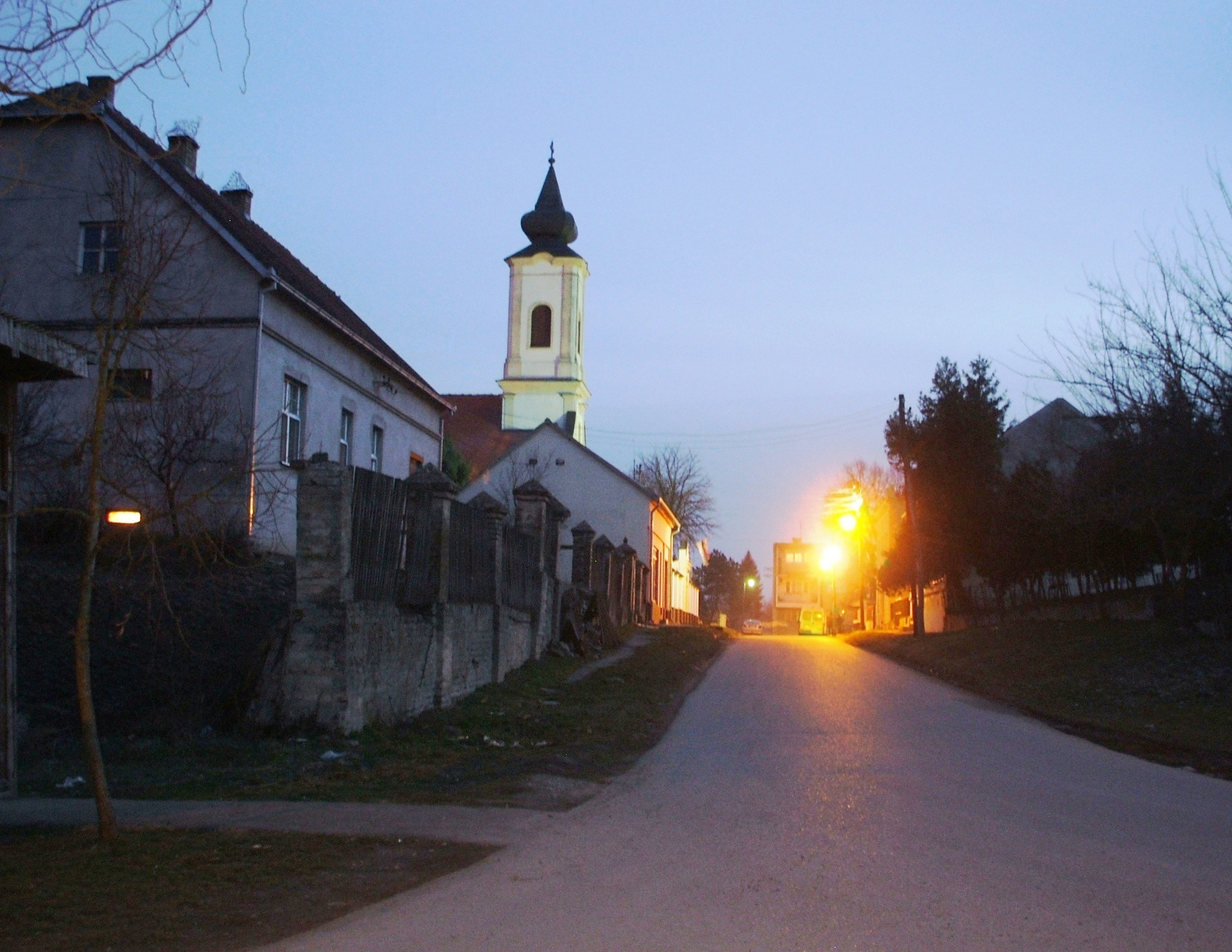 Моровић (православна црква)